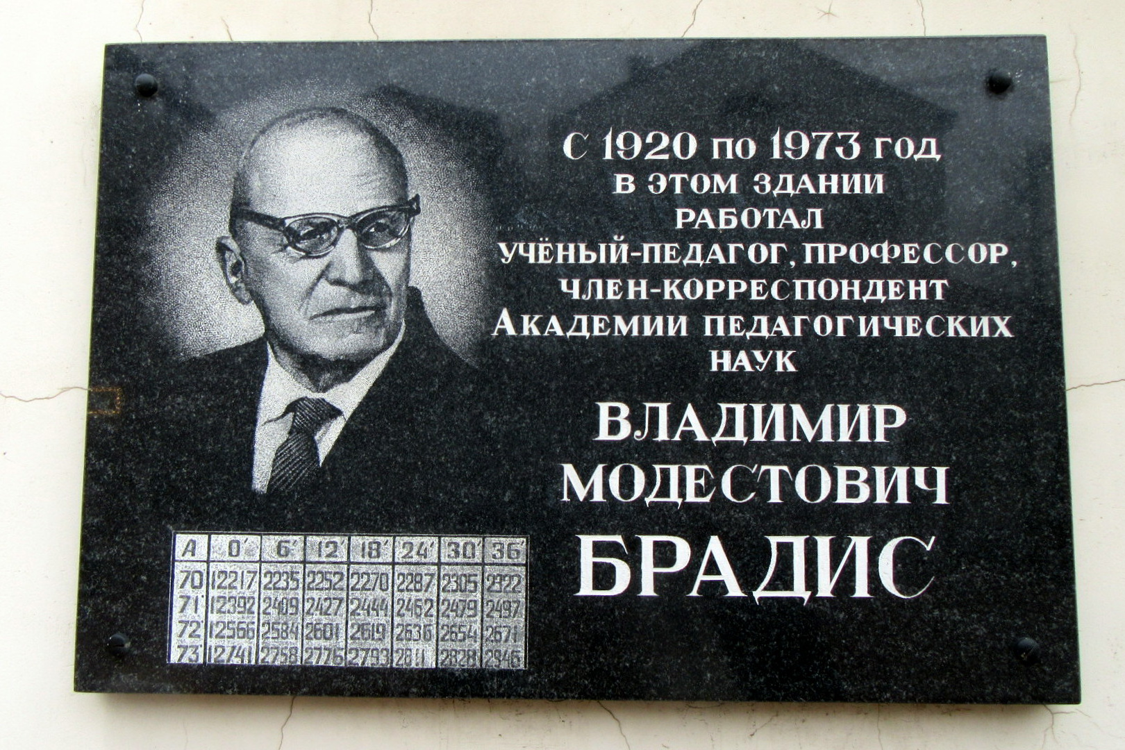 Мемориальная доска Владимиру Модестовичу Брадису на доме в Твери, где он работал